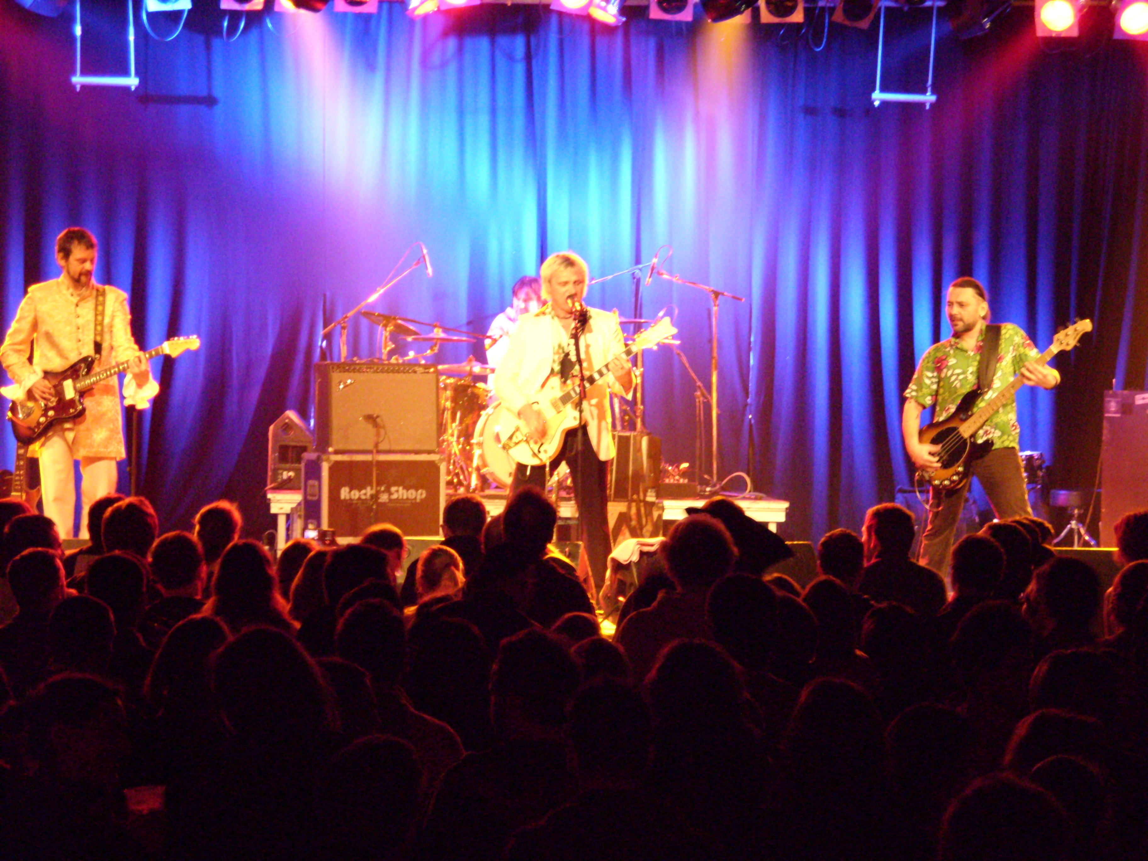 Vopli Vidopliassova im Backstage Werk München am 12.02.2010